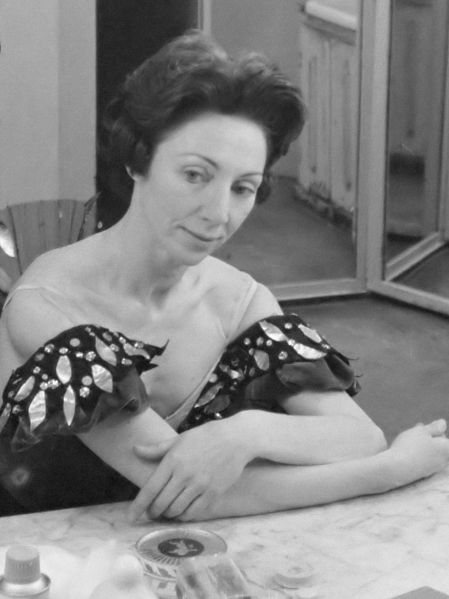 Repetitie van rosella Hightower en Alexander Kalounjny met het Amsterdams ballet 18 januari 1961